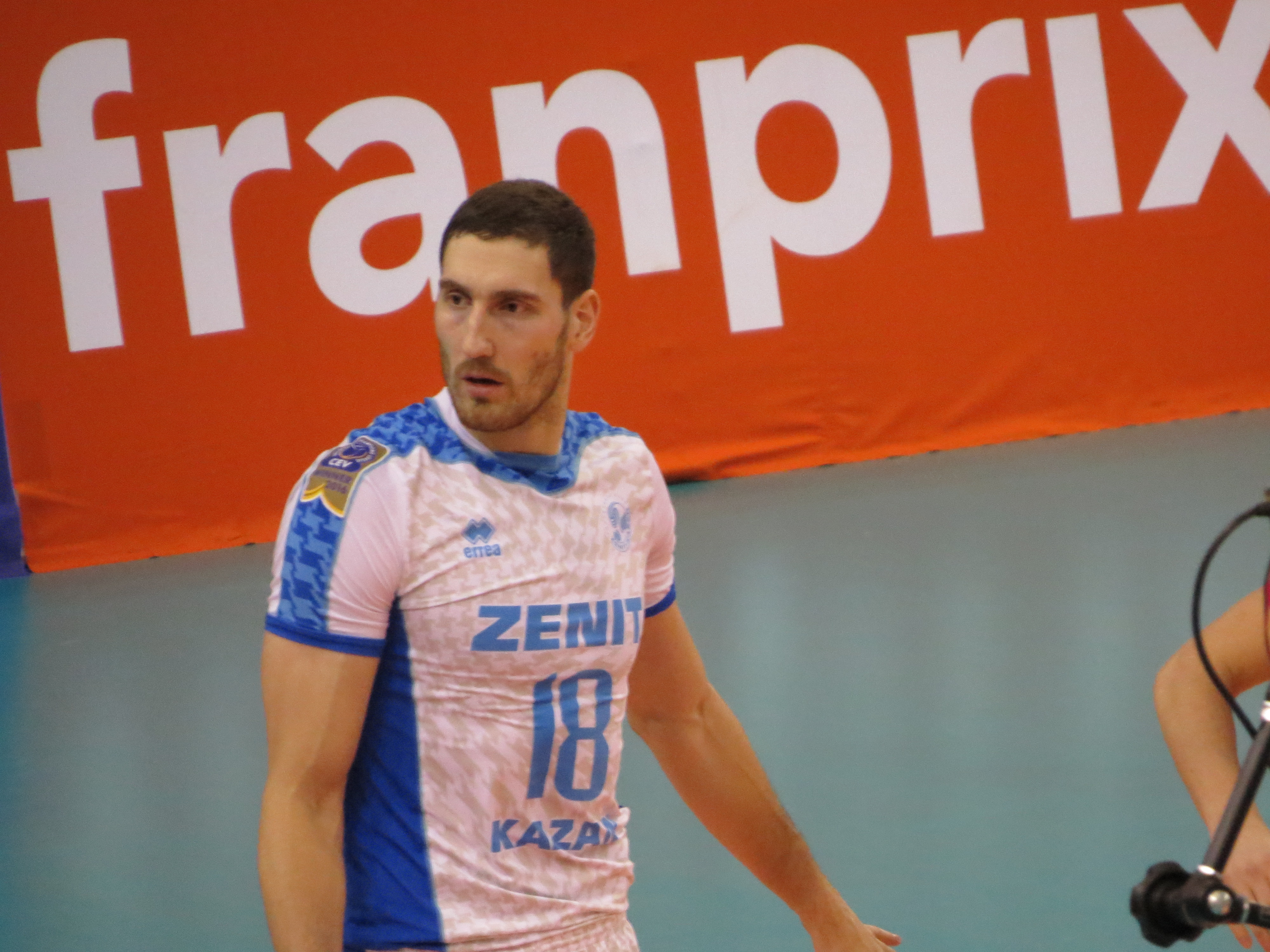 Photo réalisée lors du match de ligue des champions de volley entre le Paris Volley et Zenith Kazan 18 MIKHAILOV Maxim